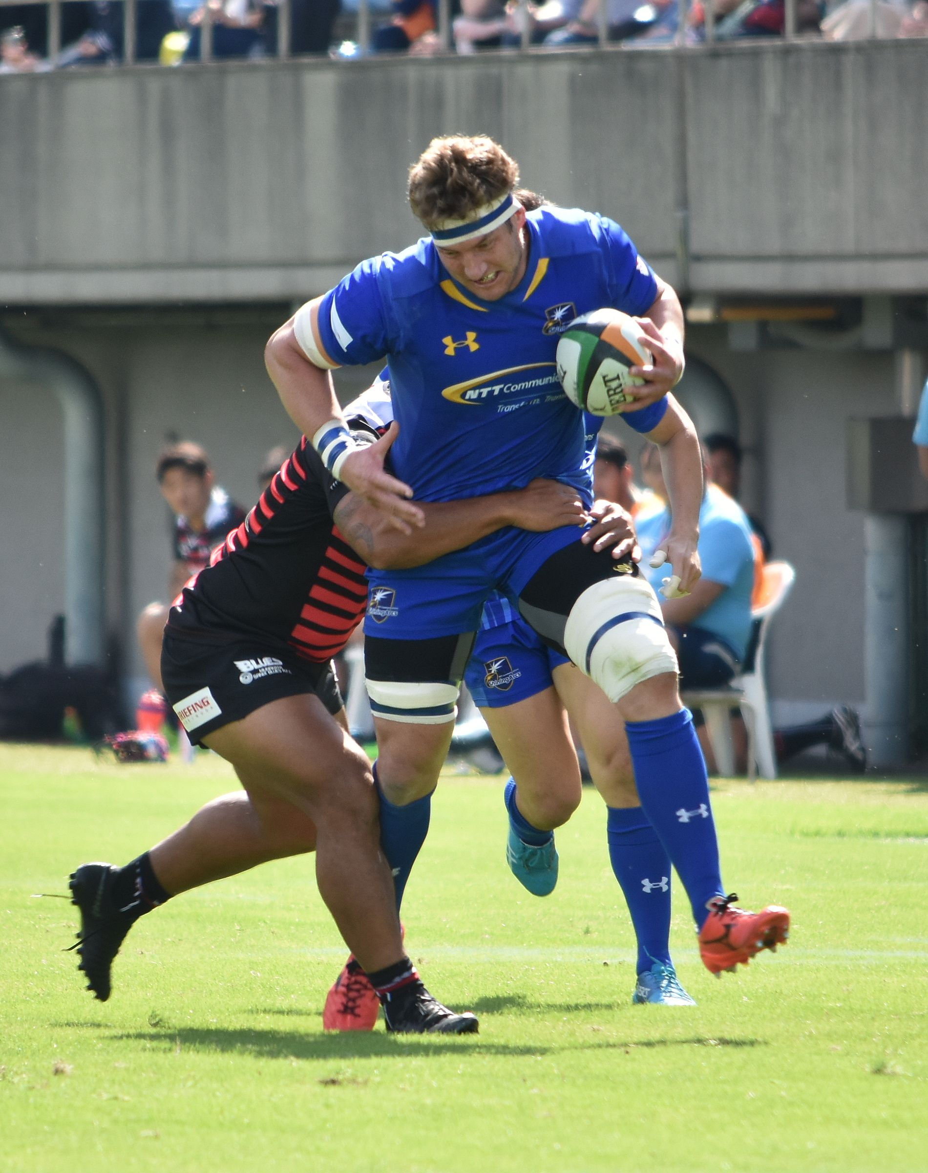 ロバート・クルーガー